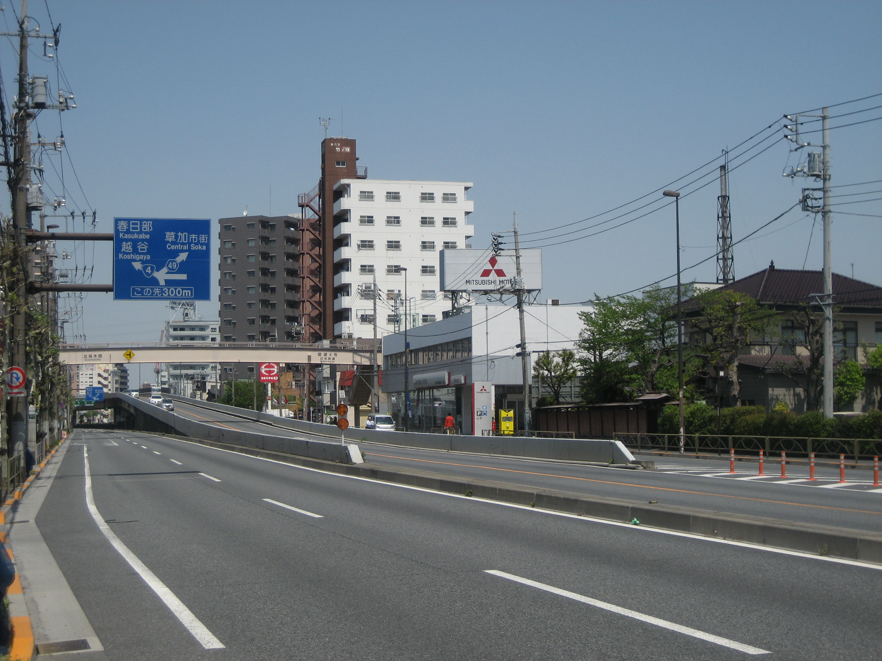 国道4号線東京都足立区西保木間2丁目付近（草加方面側を撮影）